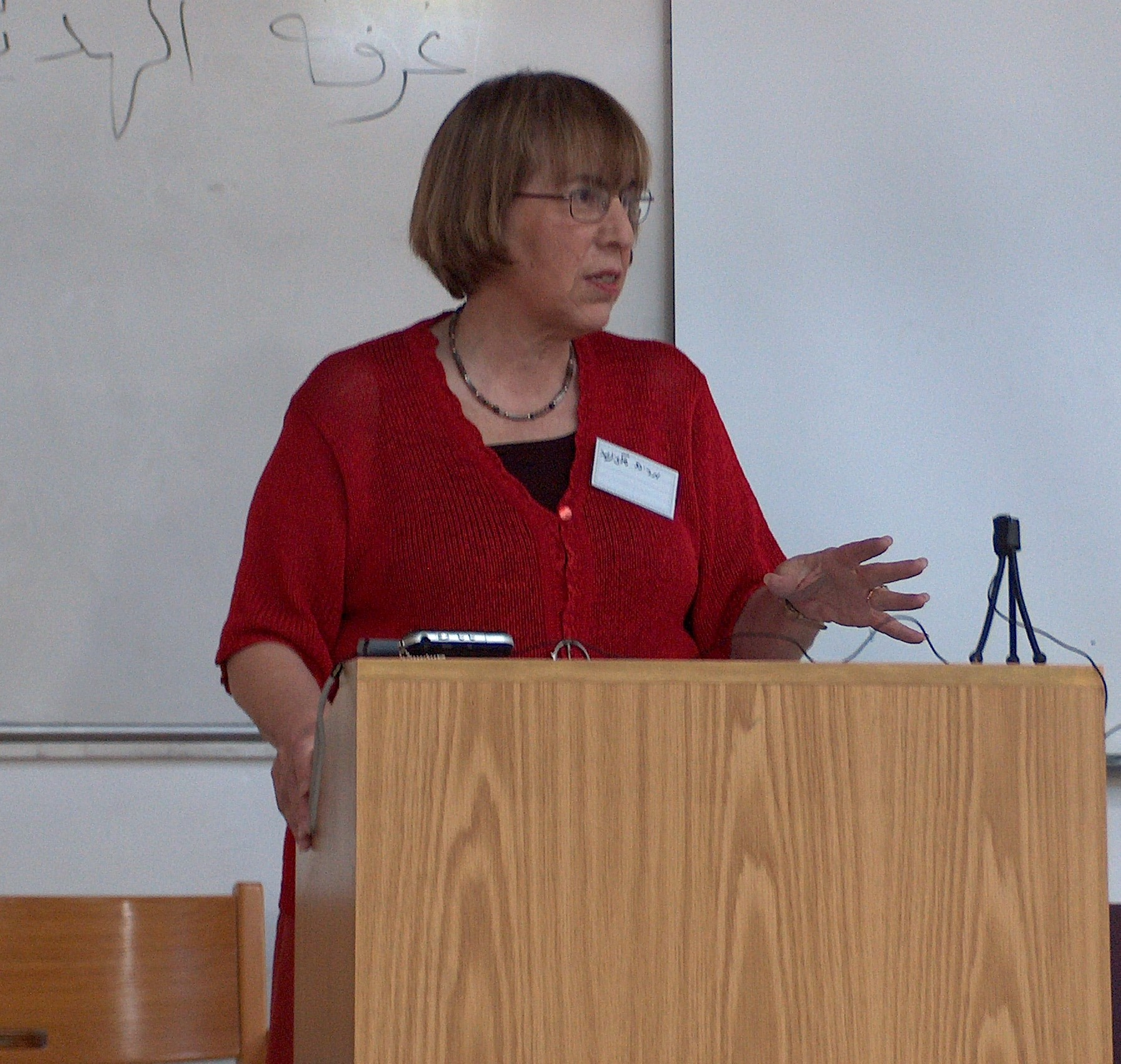 פרופ' שלזינגר מרצה בכנס מדיניות שפה באוניברסיטת בר-אילן 2008